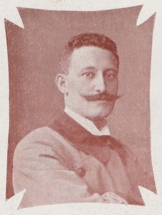 Porträt des deutschen Schriftstellers Georg Engel (1866-1931). Foto von 1899 (oder früher).